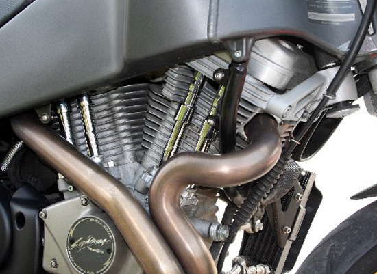 rechte Seite eines Buell XB Motors